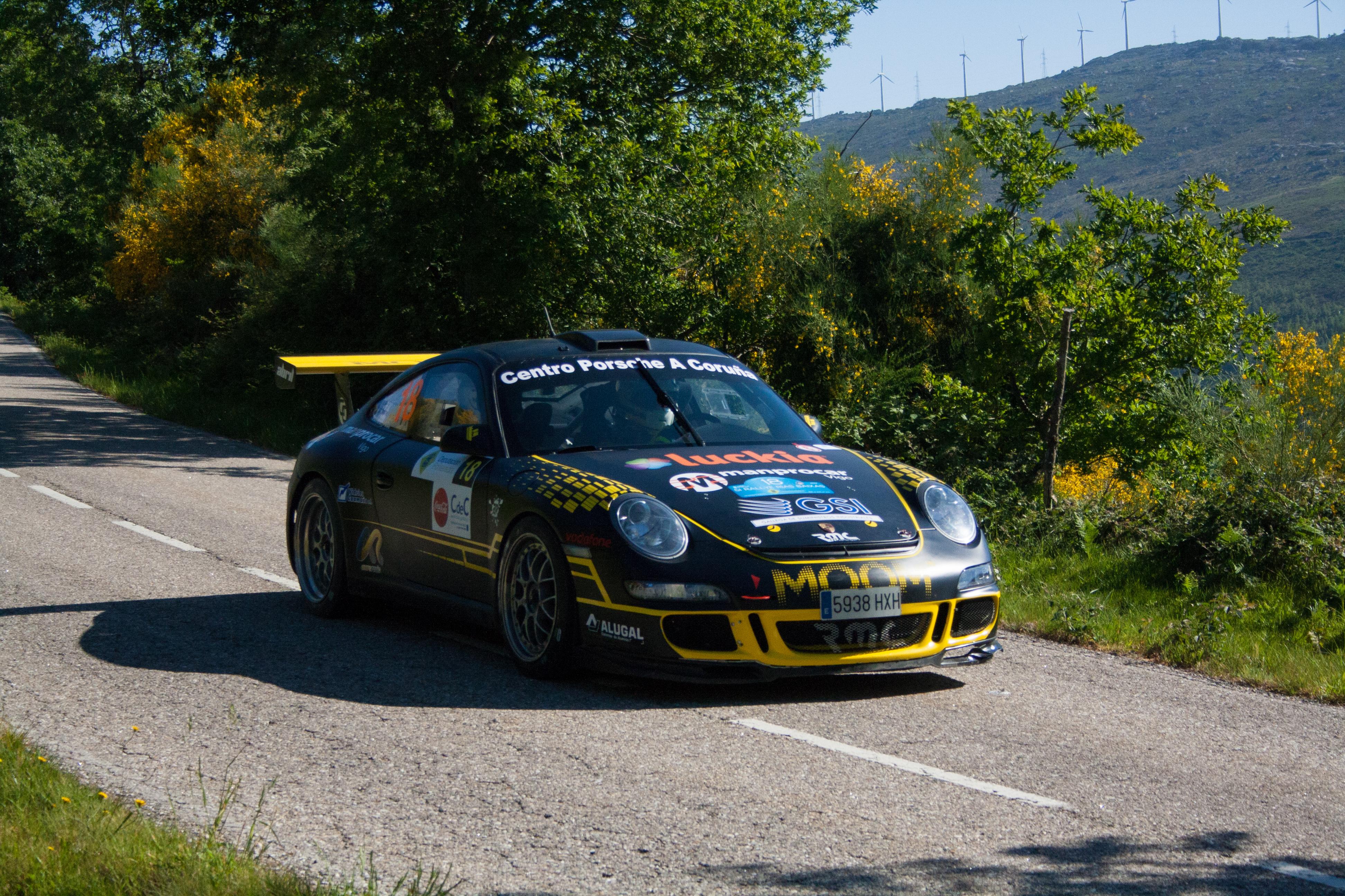 IAGOCAAMAÑO ALBERTORODRIGUEZ